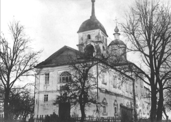 Покровский собор (1698), Брянск. Фото начала ХХ в.